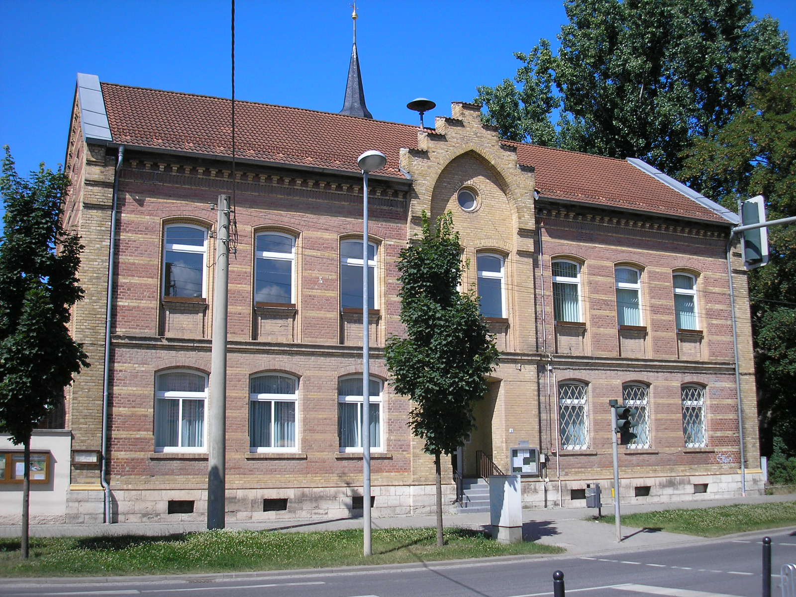 Das Rathaus von Stotternheim (Thüringen).